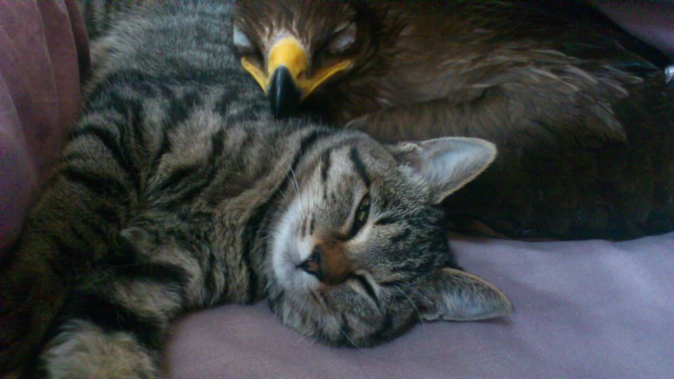 猫と寝るソウゲンワシ